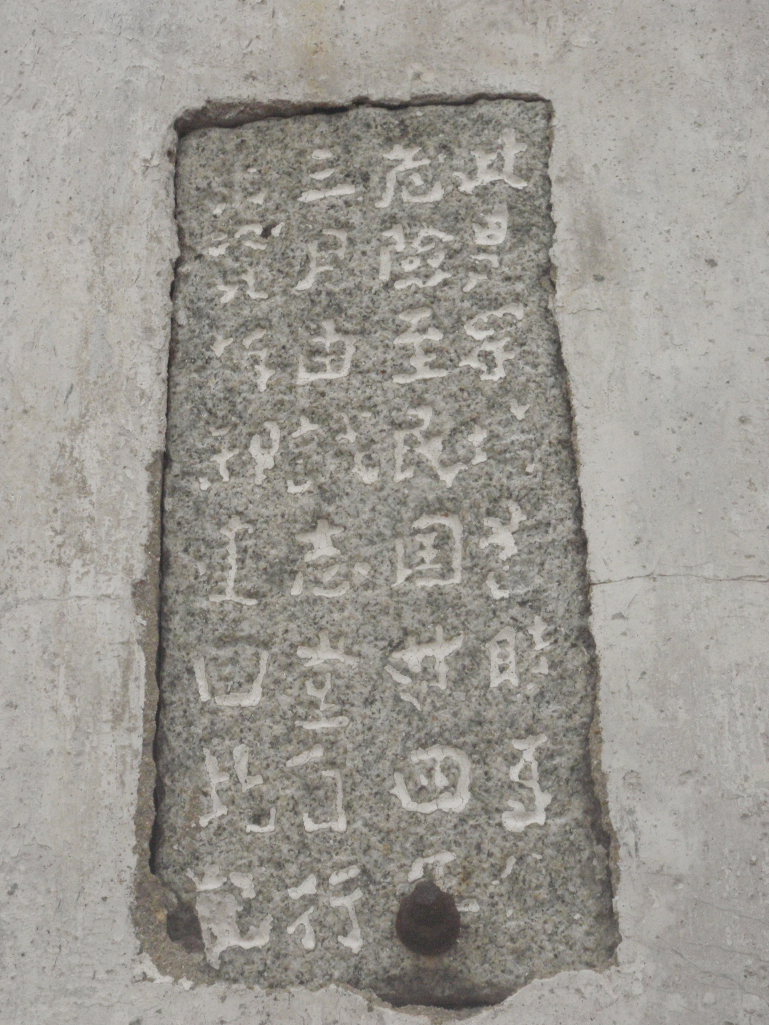 粵語: 鳳凰崗 誠志倉石碑